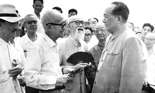 1963年7月，毛泽东和中央文史研究馆馆长章士钊（毛泽东正对的无胡须者）交谈